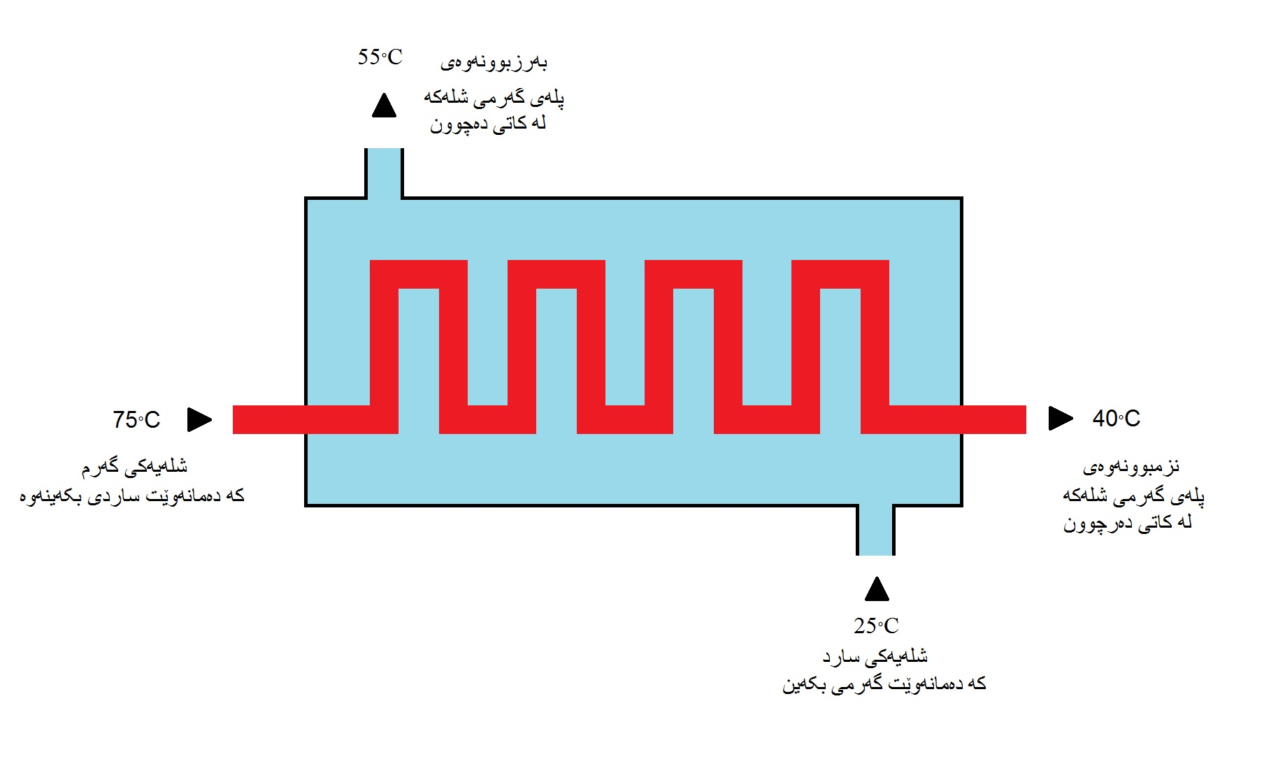 کوردی: heat